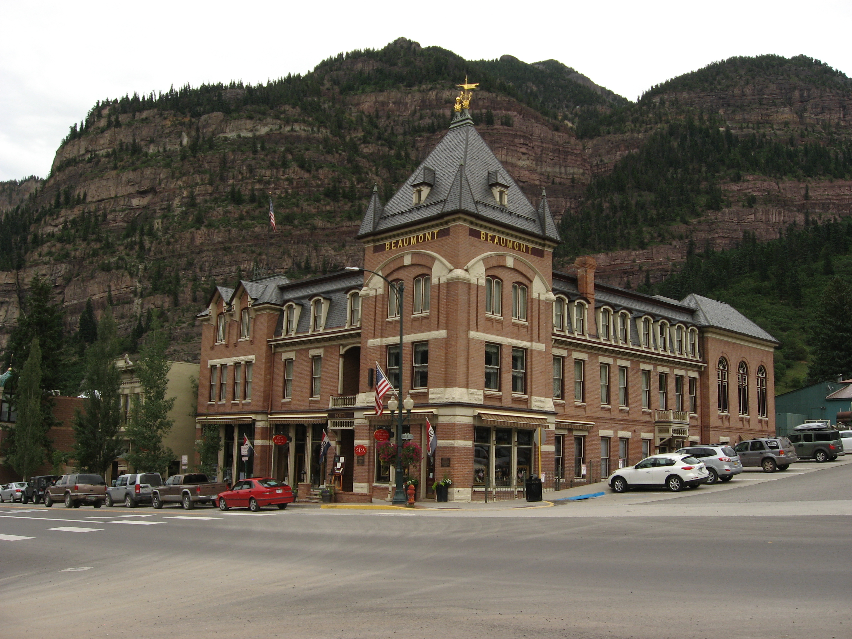 Beaumont Hotel, Ouray, Colorado (23)